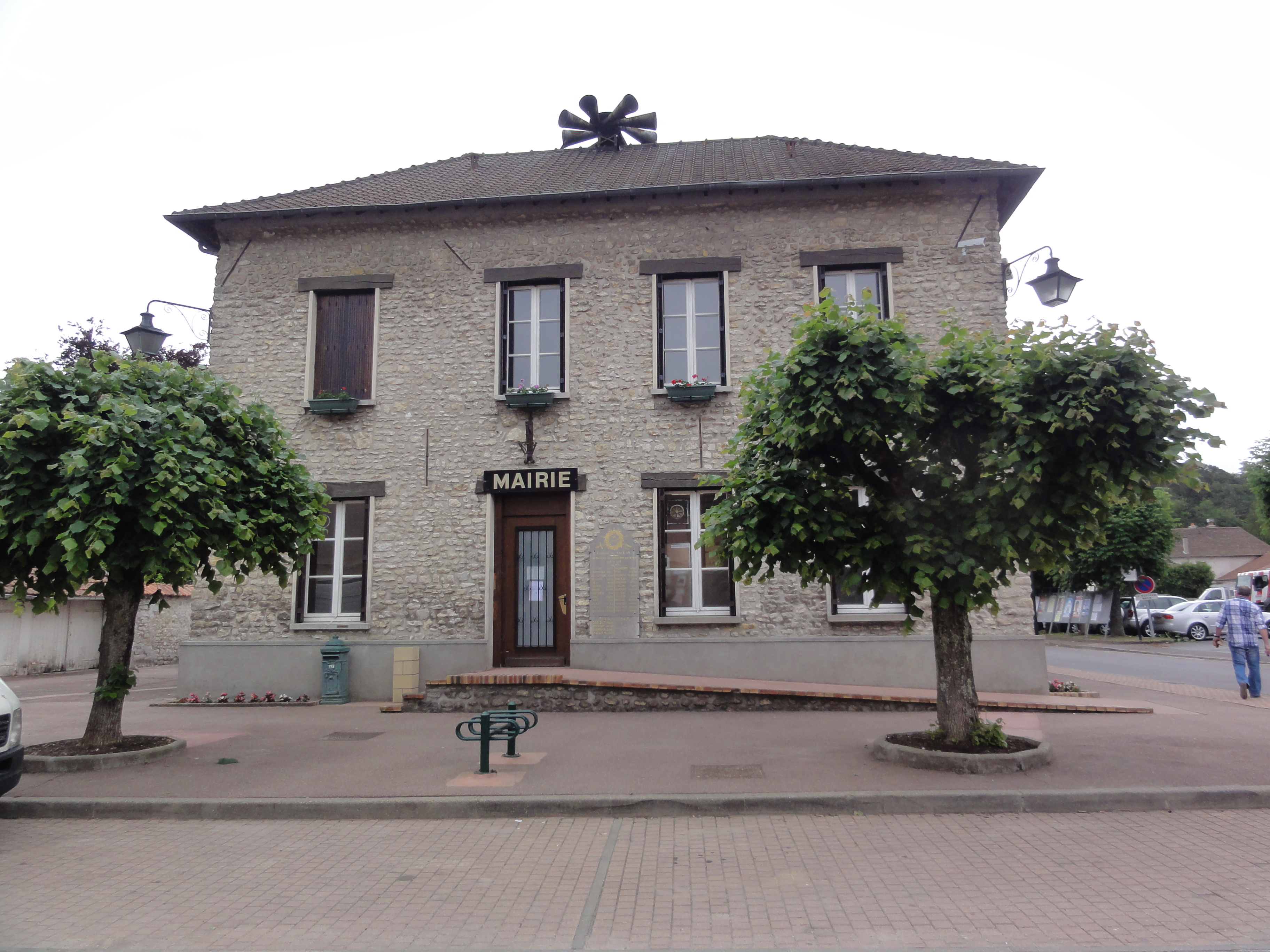 Saclas (Essonne) mairie